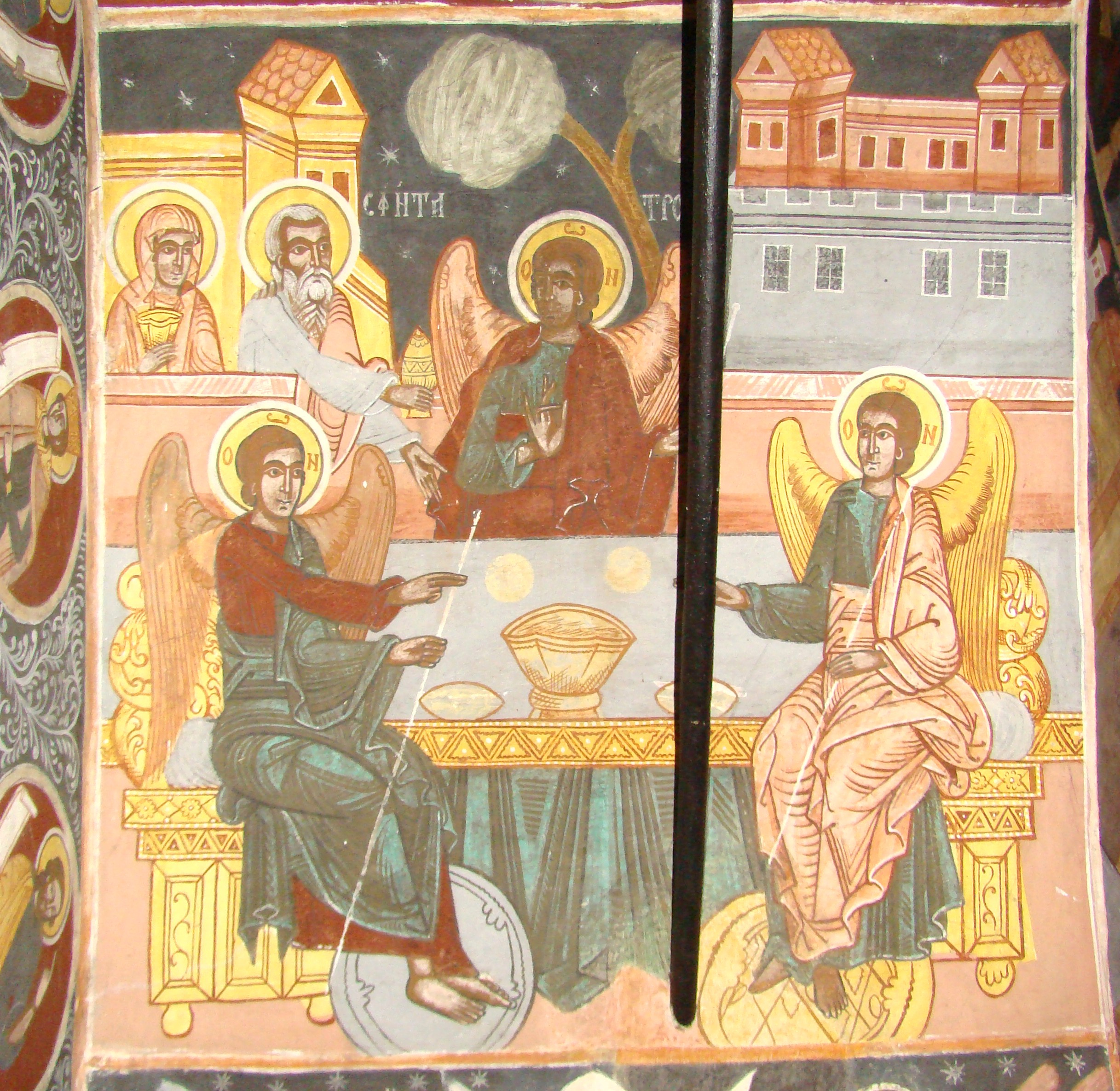 Biserica "Naşterea Domnului" , sat SĂRATA; comuna PORUMBACU DE JOS